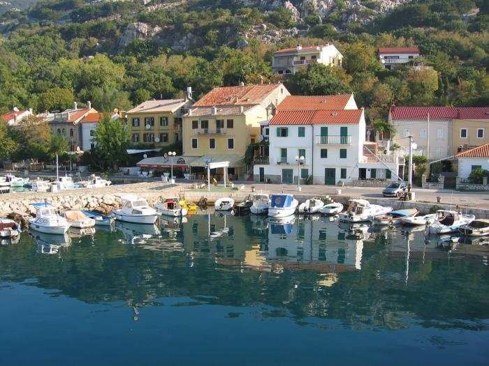 Baška, Insel Krk, Kvarner Bucht, Kroatien. Blick von der Fähre auf den Hafen. Fotograf: Benutzer:Jensflorian